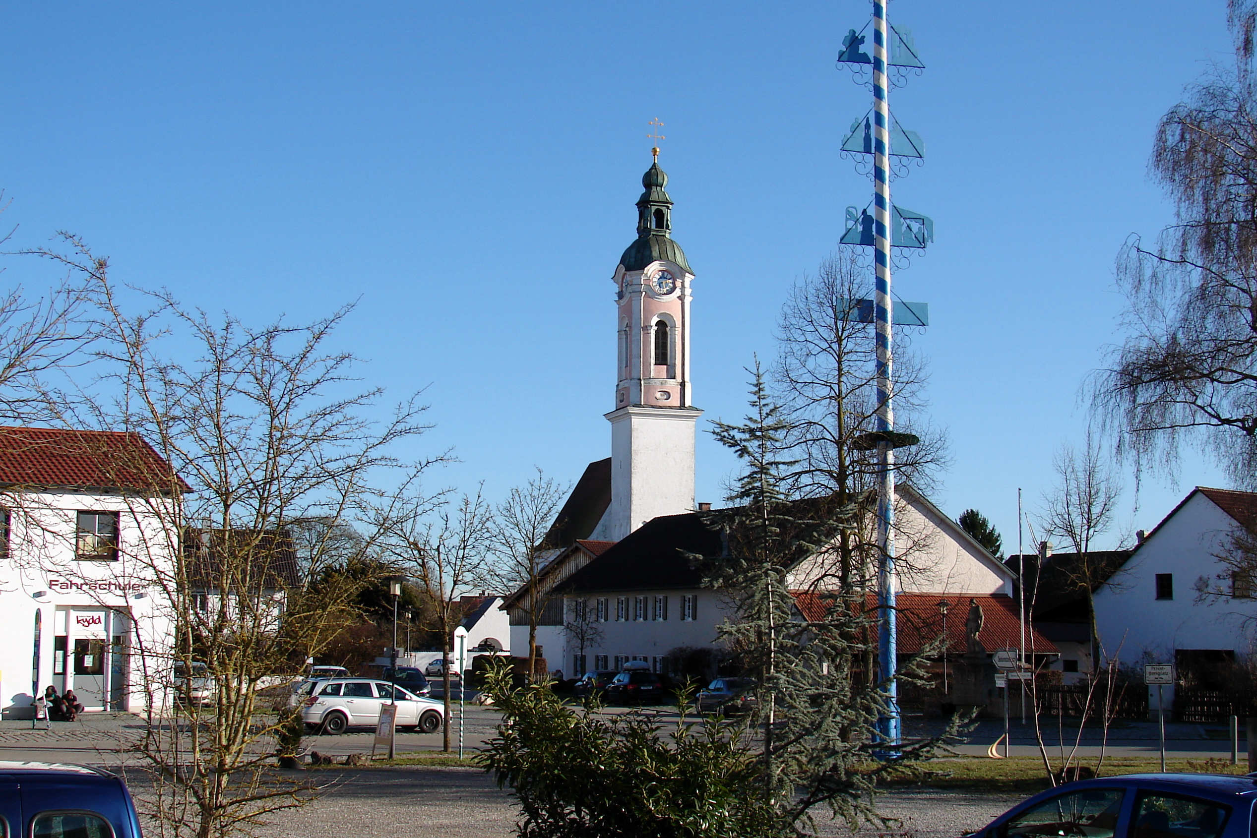 Zolling ist eine Gemeinde im oberbayerischen Landkreis Freising und Sitz der gleichnamigen Verwaltungsgemeinschaft.